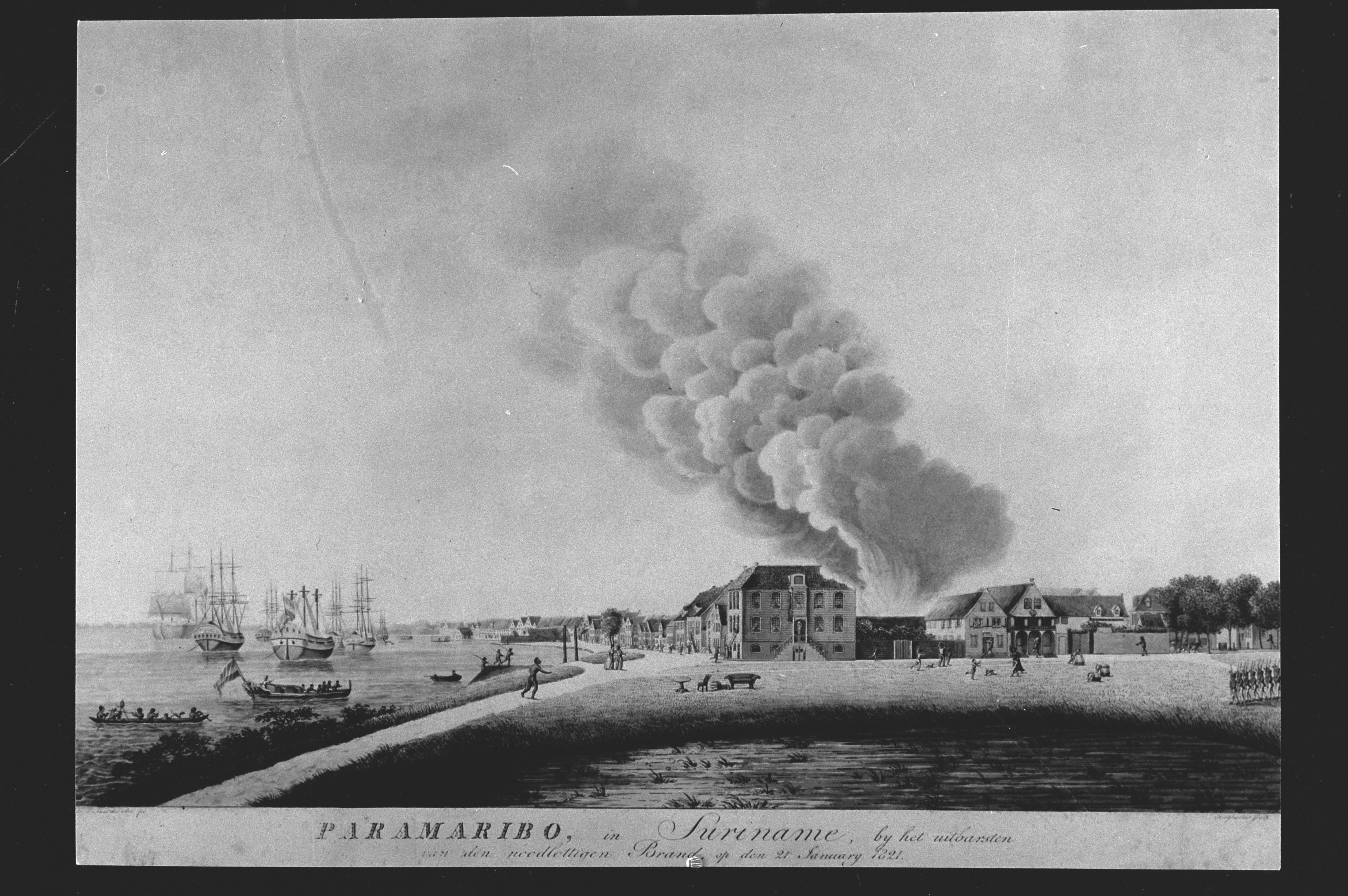 Oranjeplein en Waterkant, ten tijde van stadsbrand van 1821Onderwerp: stedensbrand